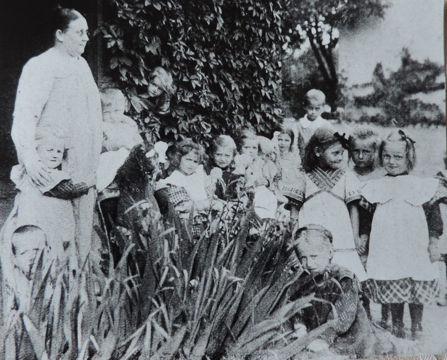 Anna Borchers im Kreise von Kindergartenkinder